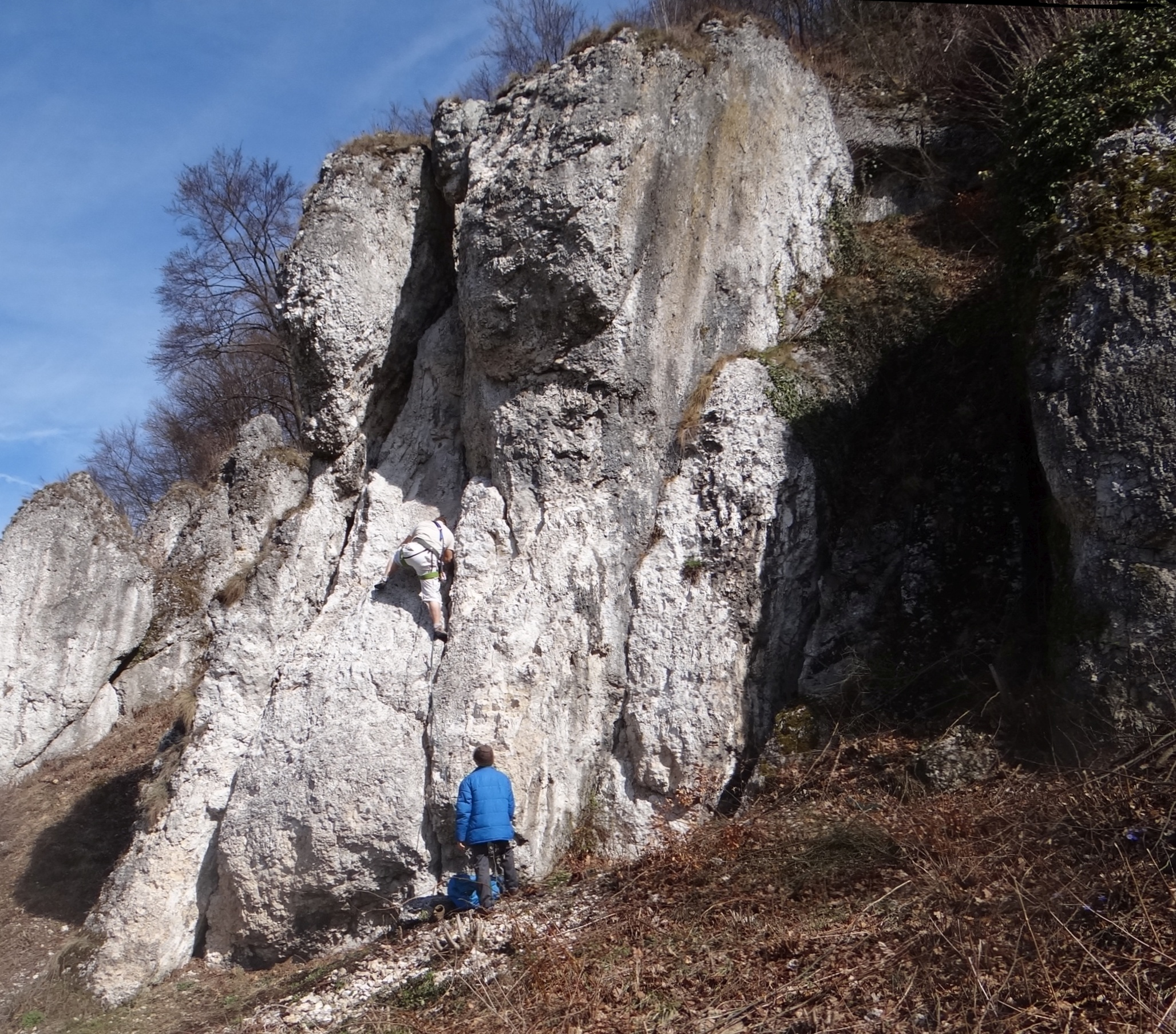 Skała Bramka w grupie Skał nad Boiskiem w Dubiu